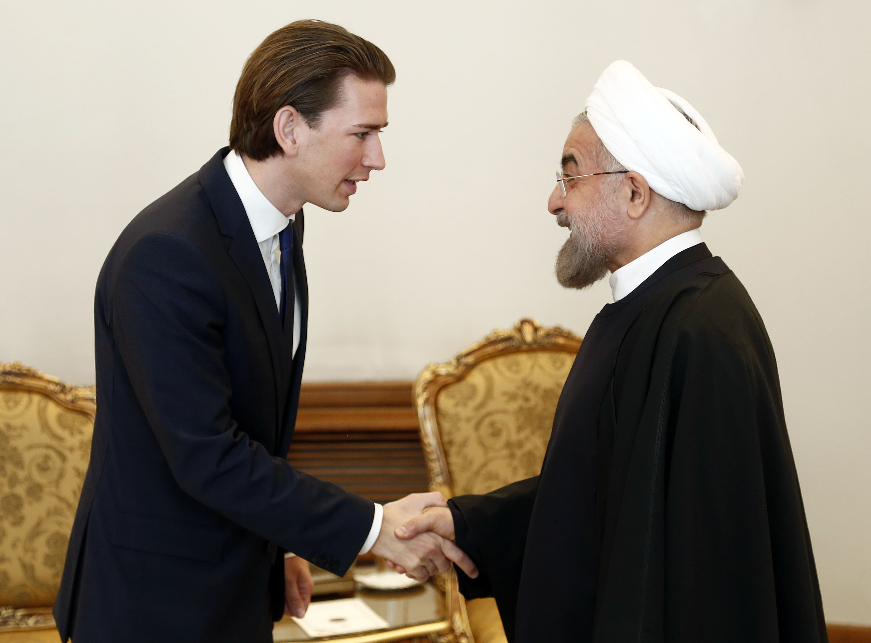 Arbeitsbesuch Iran. Außenminister Sebastian Kurz trifft Hojatoleslem Hassan Rohani, Präsident der Islamischen Republik Iran. Teheran, 28.04.2013, Foto: Dragan Tatic